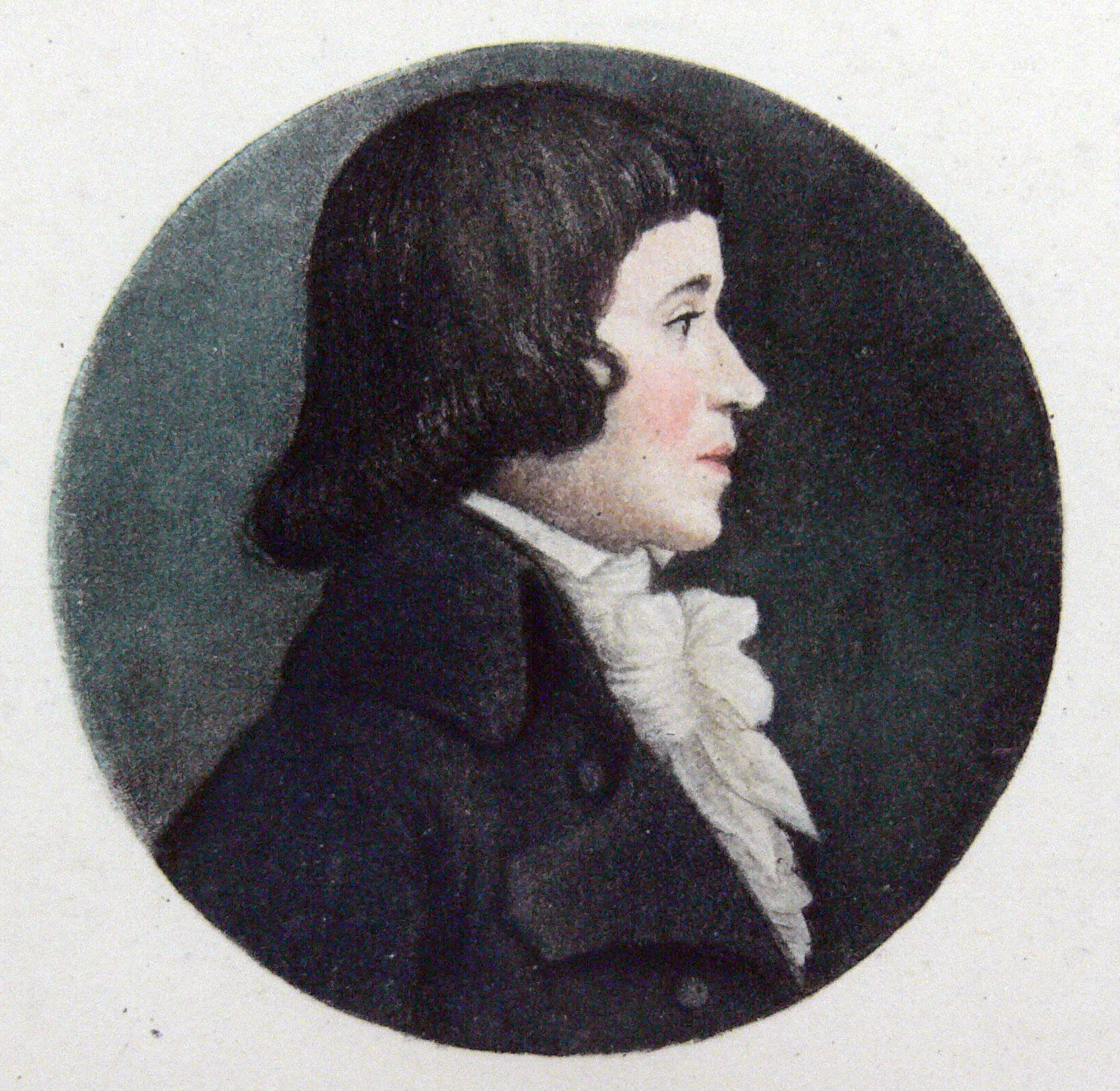 Estampe de 1889 (reproduisant certainement un tableau) représentant Sébastien Bottin en 1790